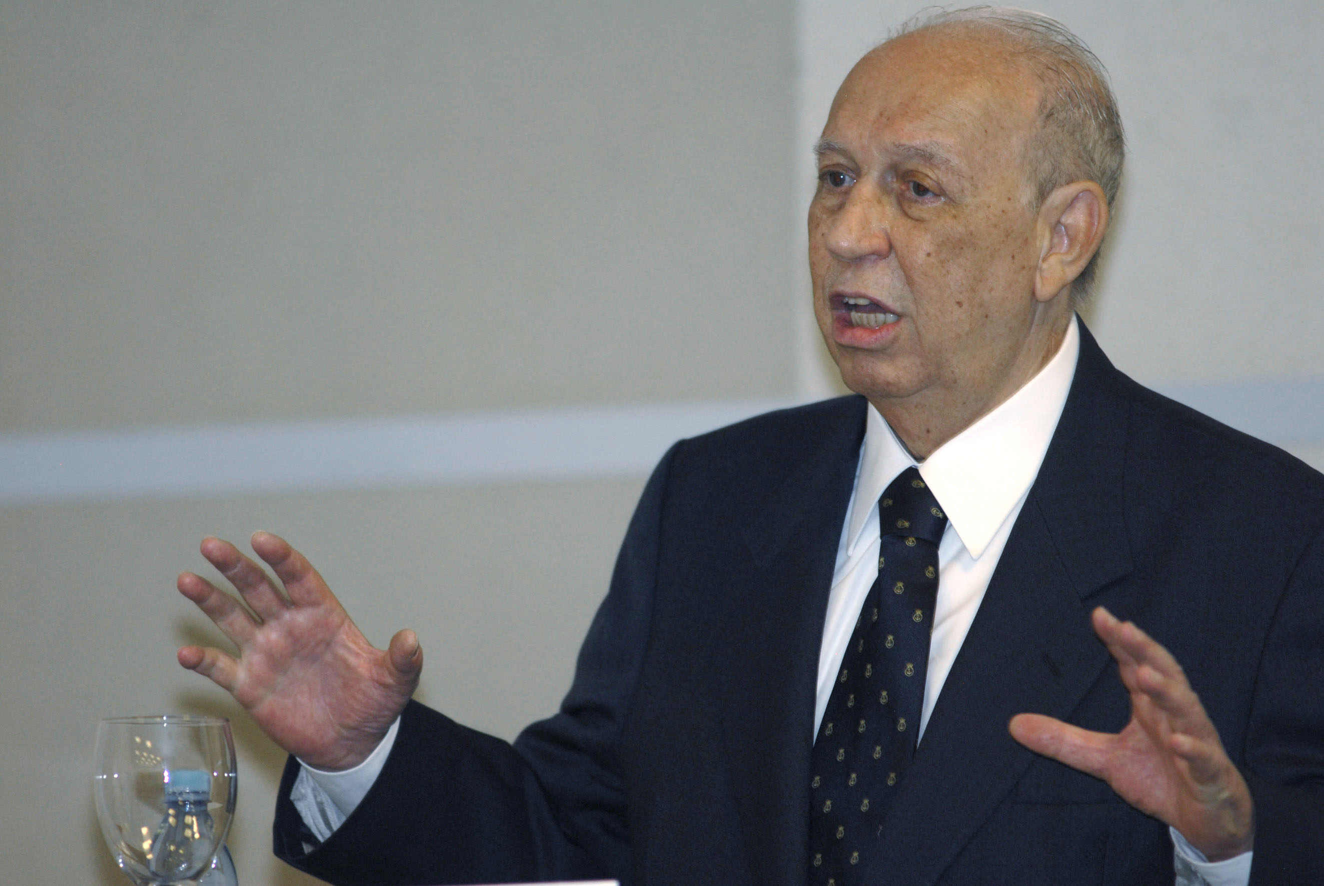 Brasília - O presidente em exercício, José Alencar, faz palestra para um grupo de investidores internacionais, no Hotel Blue Tree Alvorada.